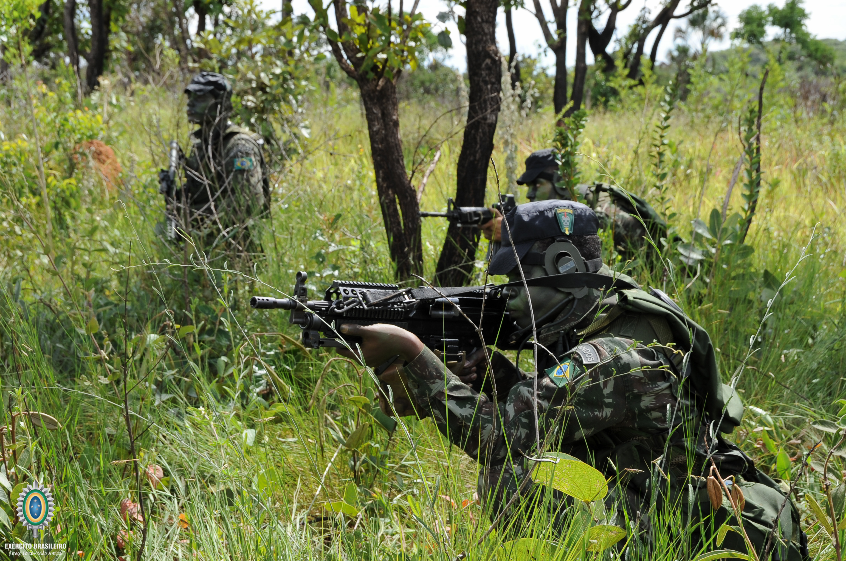 Comandos, Forças Especiais, combatente, Exército, Tiro instintivo caatinga, paraquedistas, atirador, sniper, mergulhadores